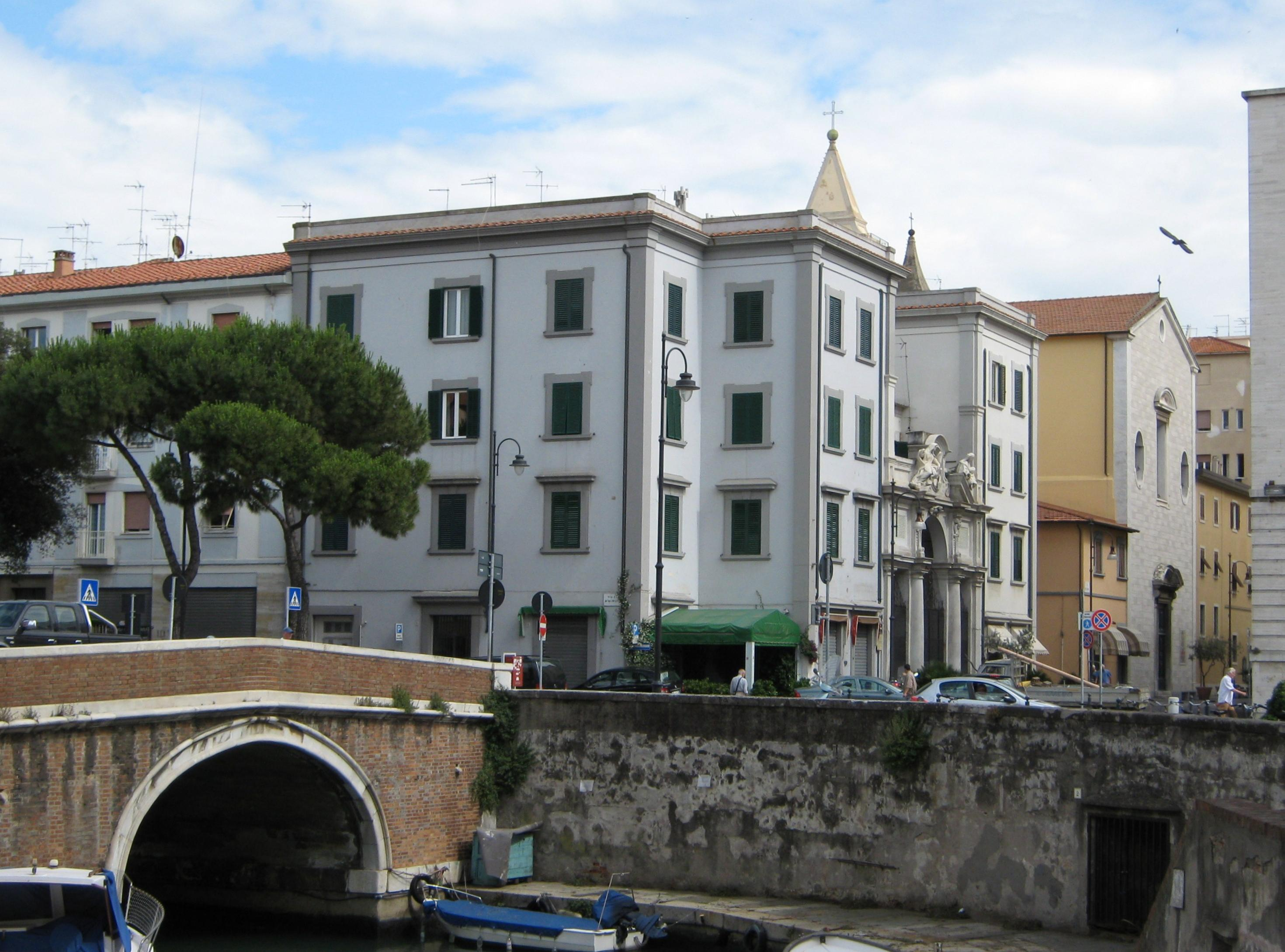 Livorno: la chiesa armena di San Gregorio Illuminatore e quella Madonna.